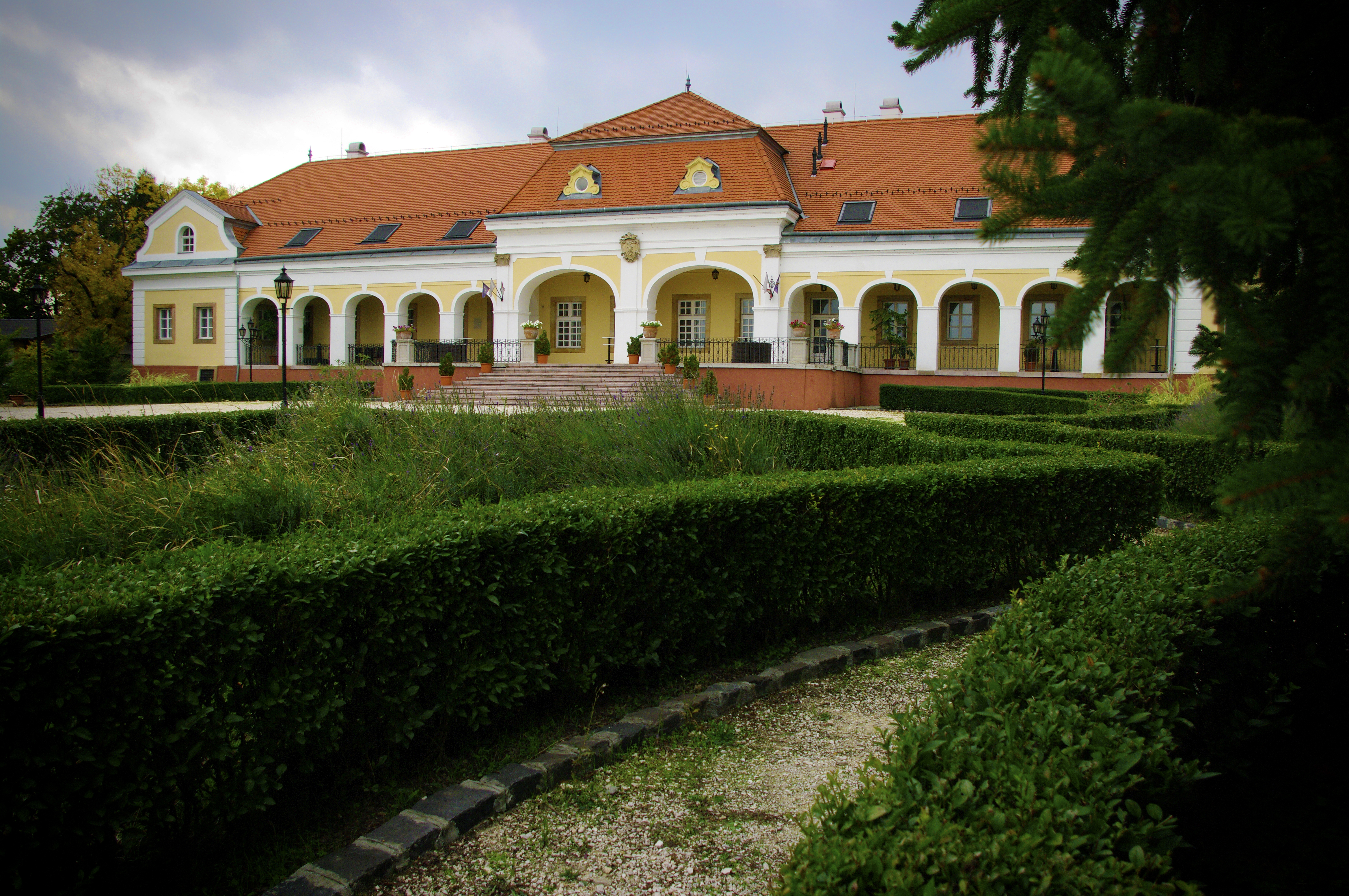 Teleki–Wattay-kastély This is a photo of a monument in Hungary. Identifier: 7250